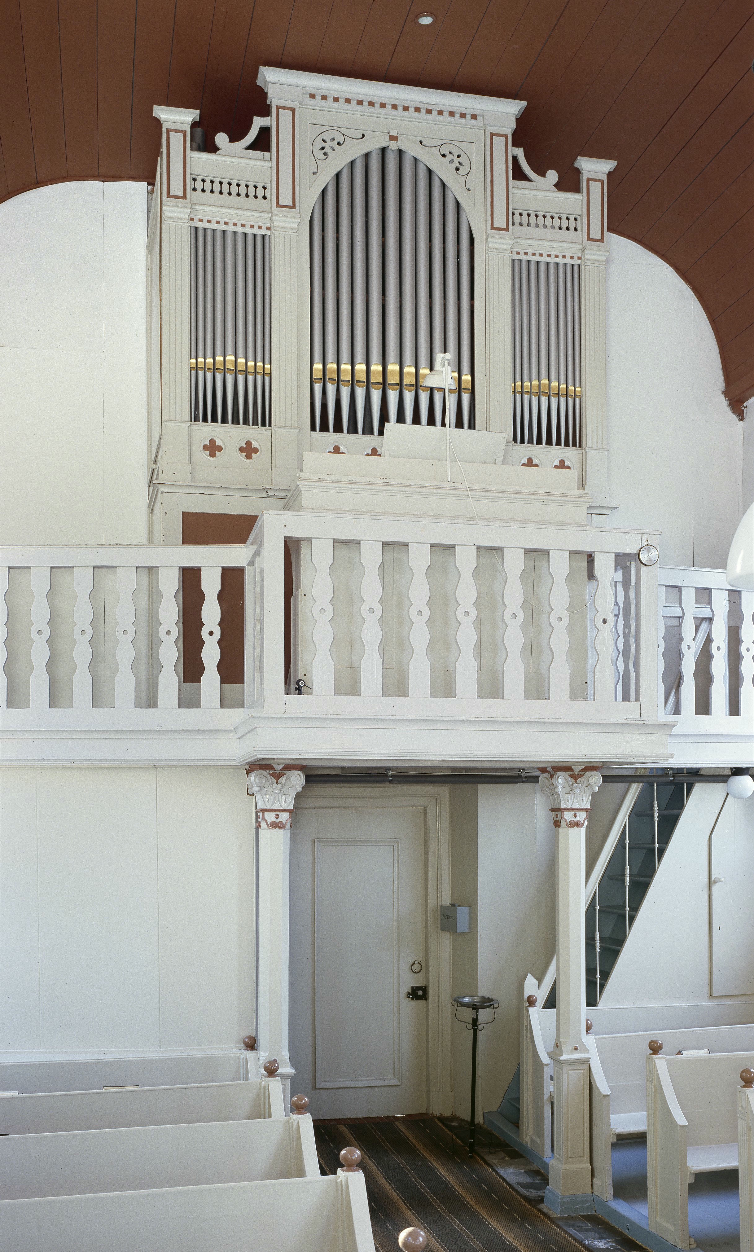 Nederlands Hervormde Kerk: Interieur, aanzicht orgel, orgelnummer 1310 (opmerking: Gefotografeerd voor Het Historische Orgel in Nederland 1894-1901, bladzijde 262)